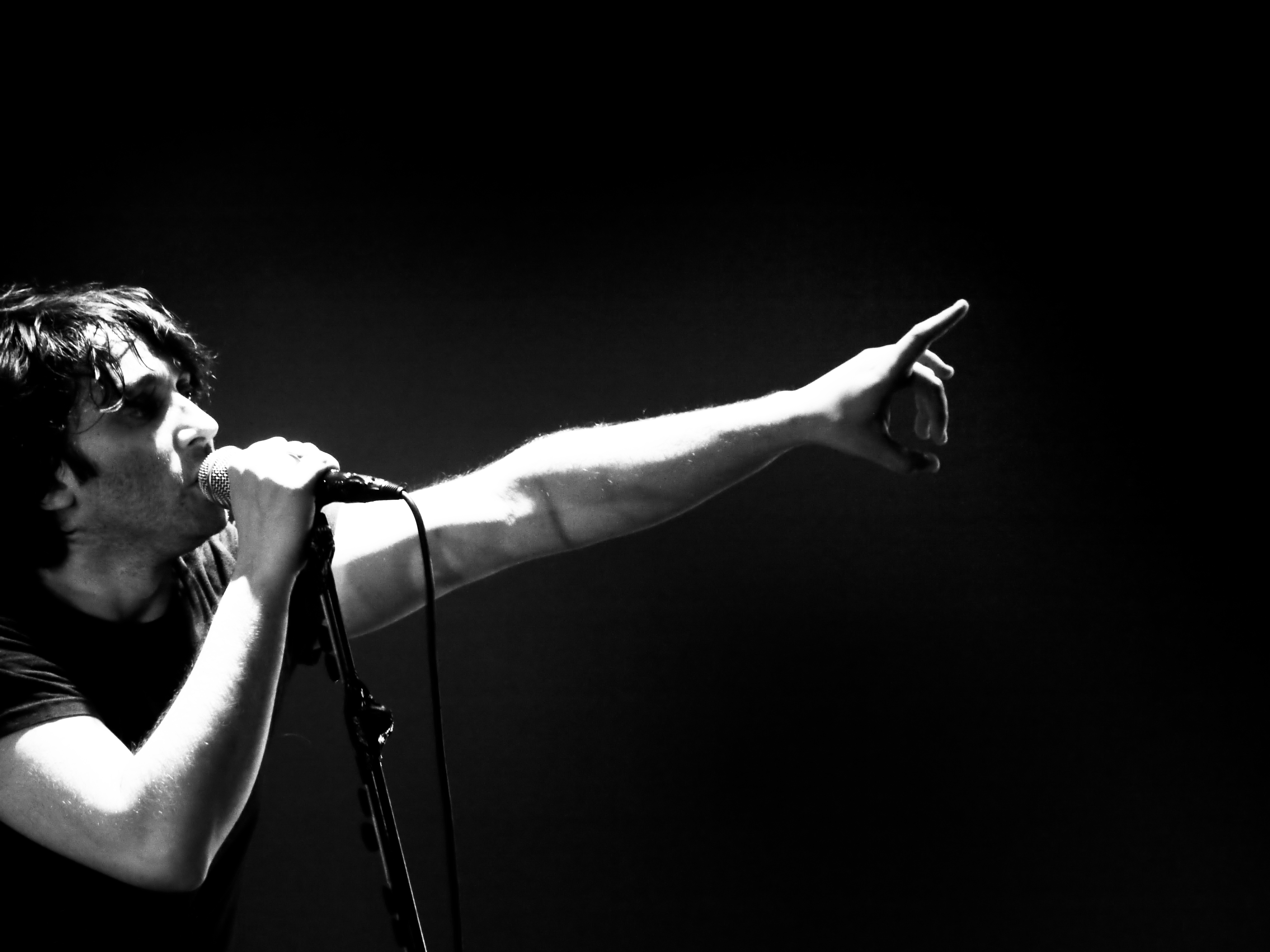 Damien Saez en concert par David Bakhoum